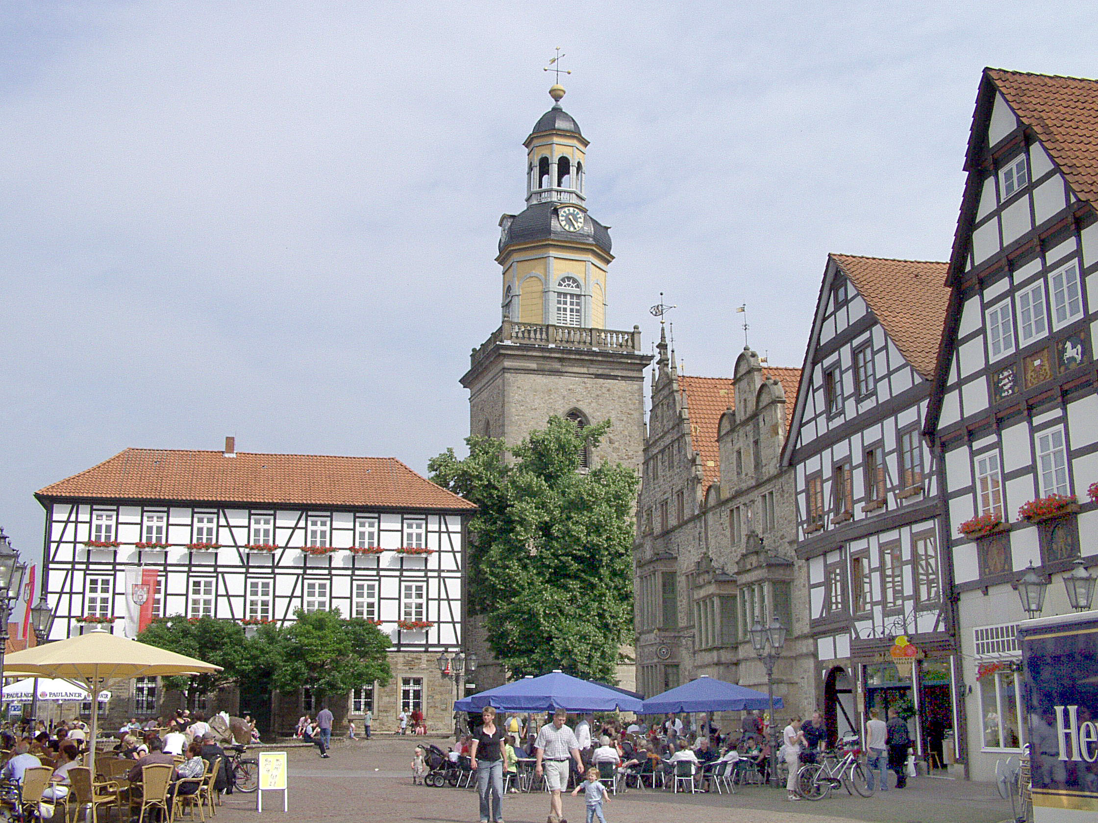 Blick auf den Rintelner Marktplatz mit ehemaligem Rathaus, Stadtkirche St. Nikolai und Ratskeller.